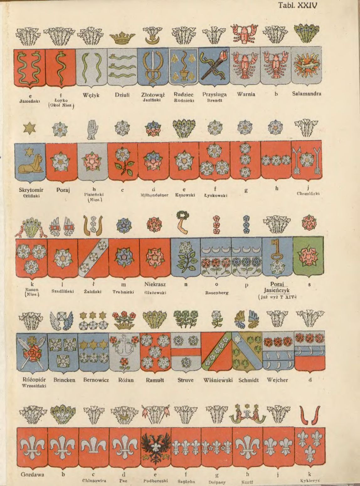 Tablica herbowa XXIV Chrząńskiego